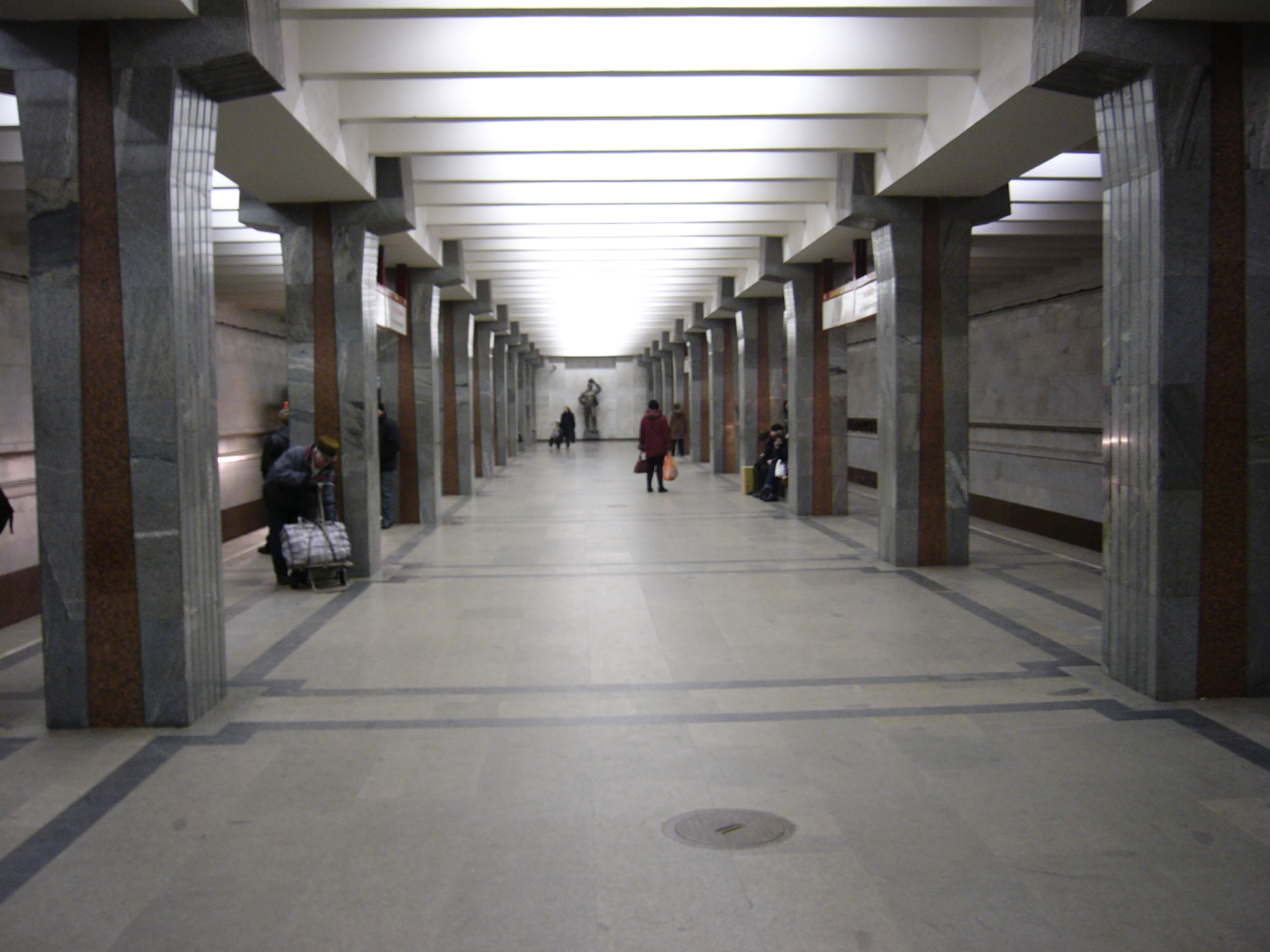 Metro station Proletarskaya in Minsk, Belarus